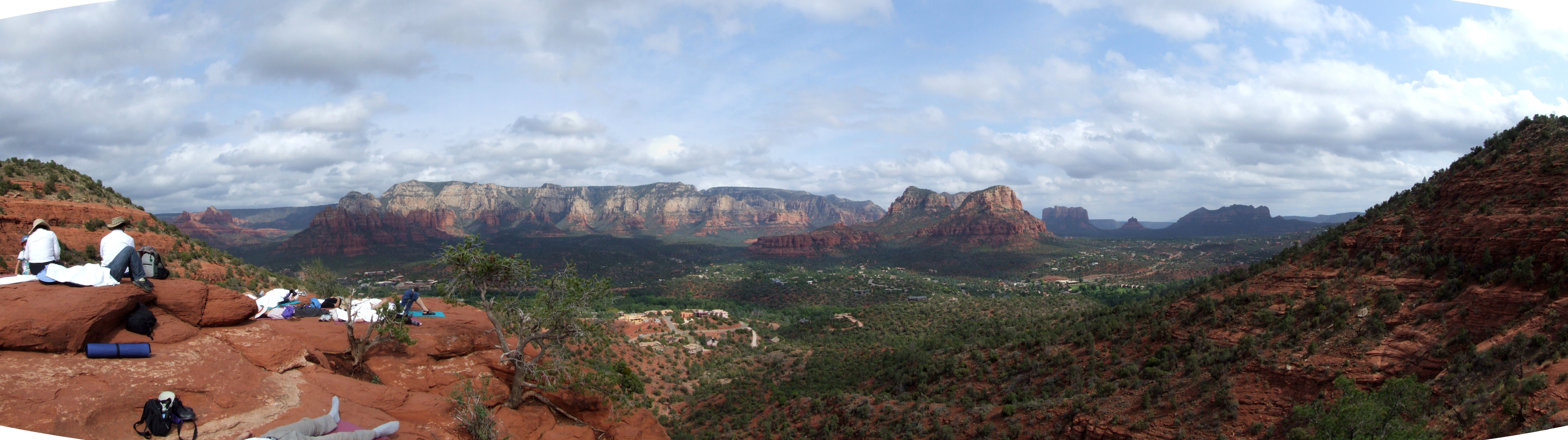 Panorama von Sedona